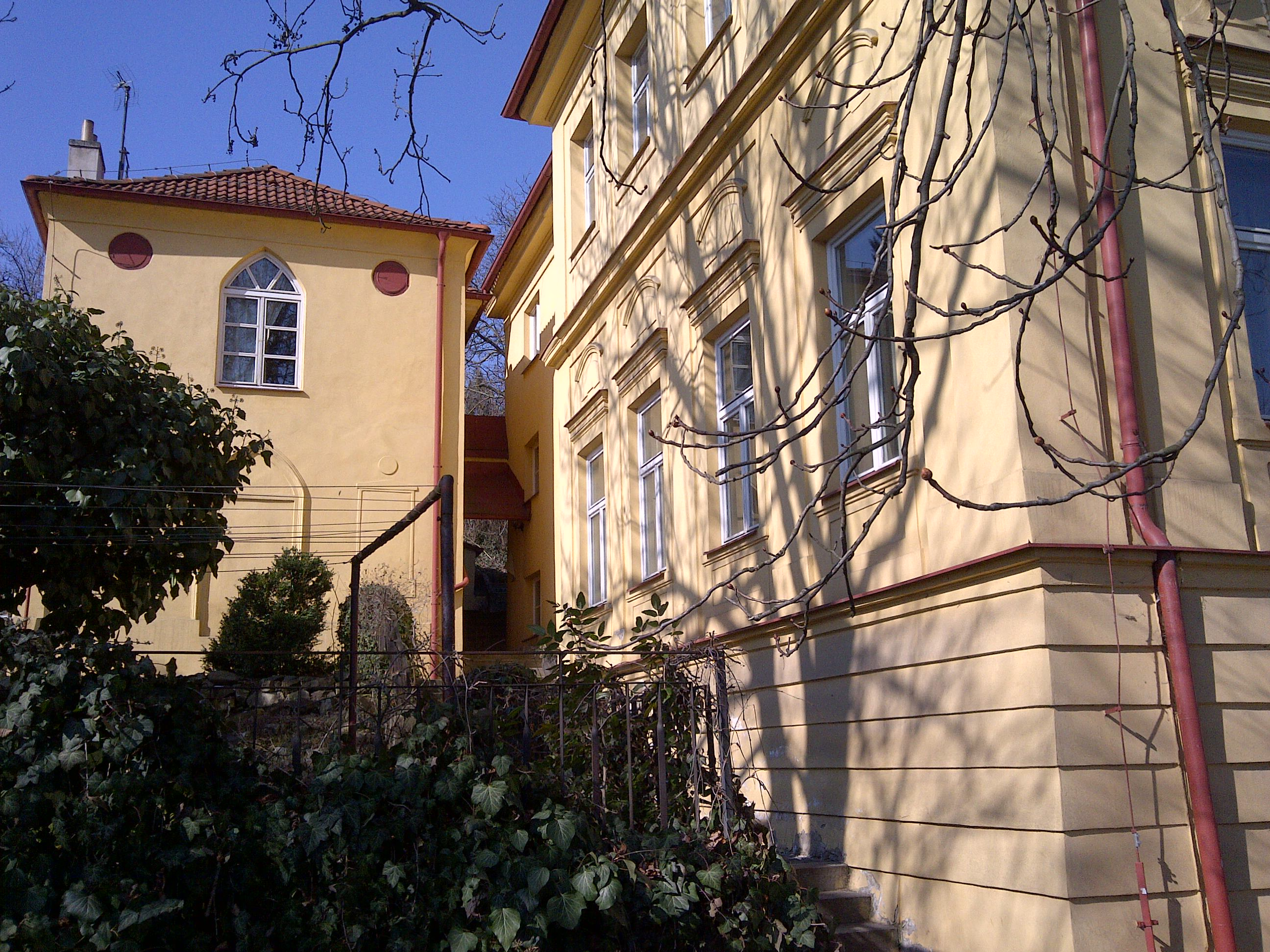 Usedlost Koulka, Praha 5-Smíchov, Křížová, Koulka 189/37